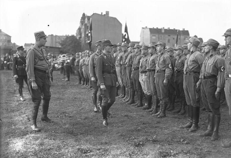 1932, Berlin-Britz: Heerführer Ernst besichtigt die SA.